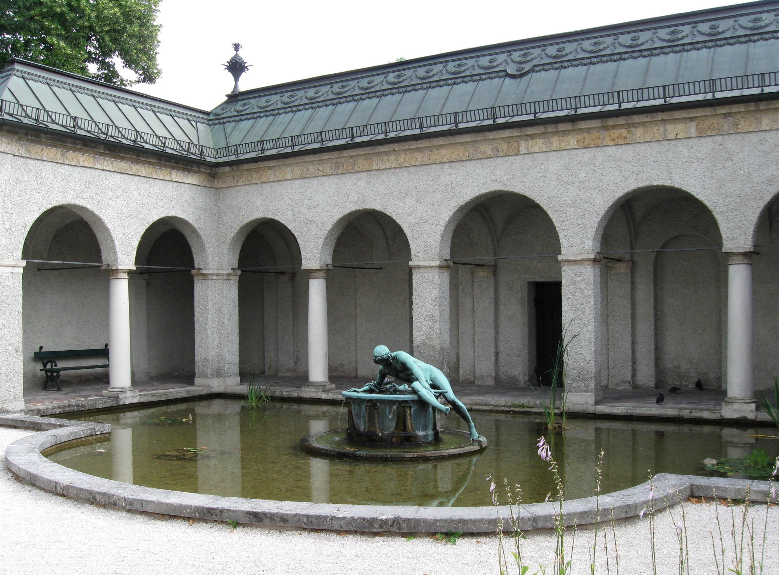 Narzissbrunnen im Hof des Bayerischen Nationalmuseums, 1896 von Hubert Netzer, Prinzregentenstraße, Lehel, München